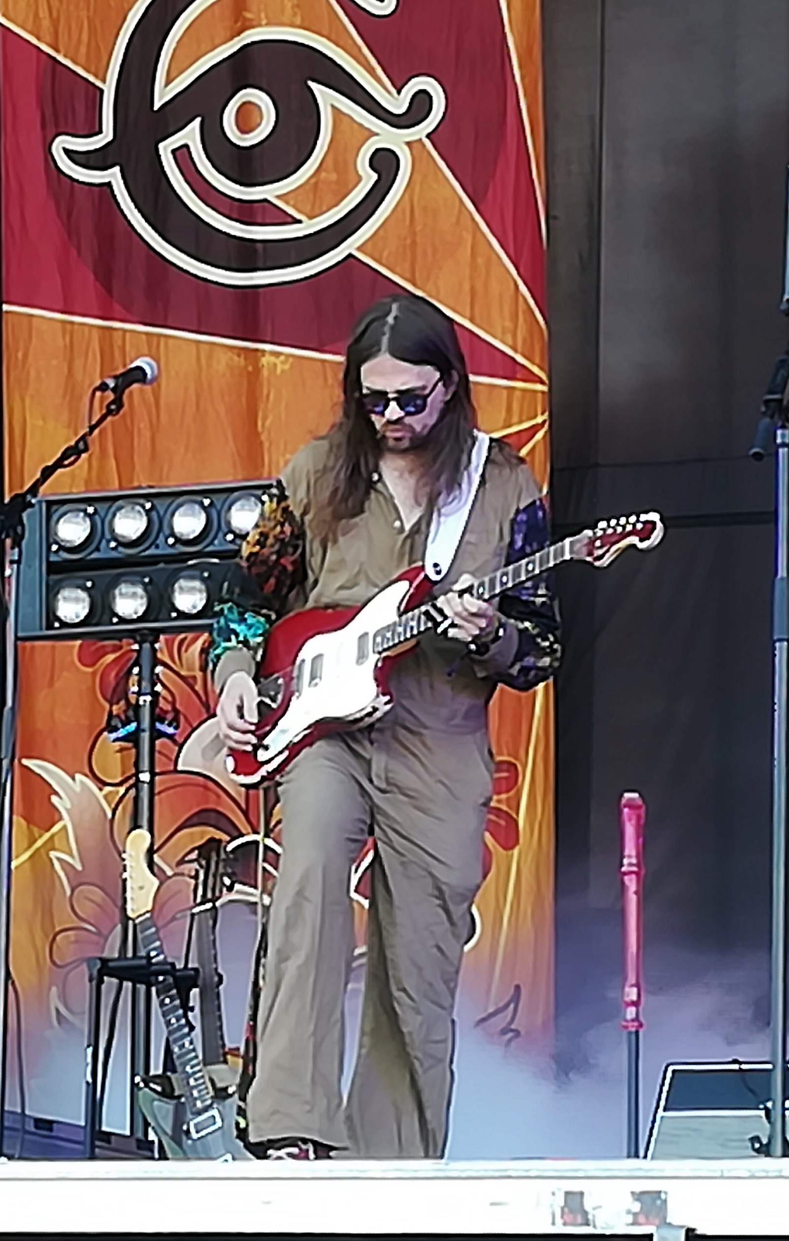 Timo Kämäräinen kesällä 2019 Ellipsin keikalla.